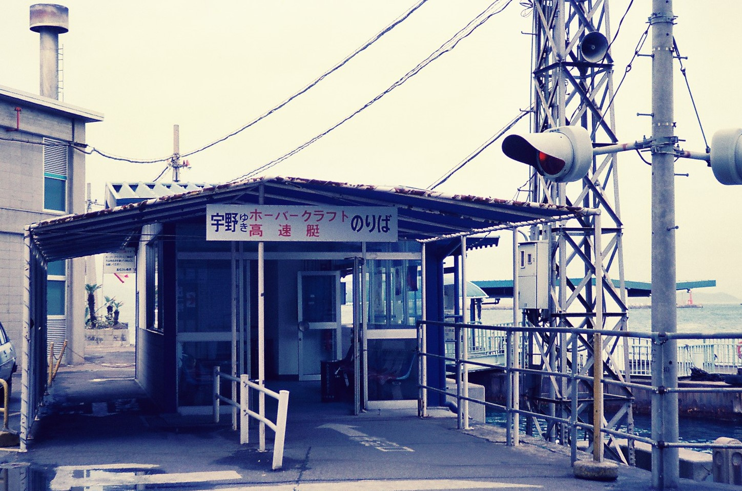 高松駅の宇高連絡船ホーバークラフト・高速艇乗り場（1988年3月）